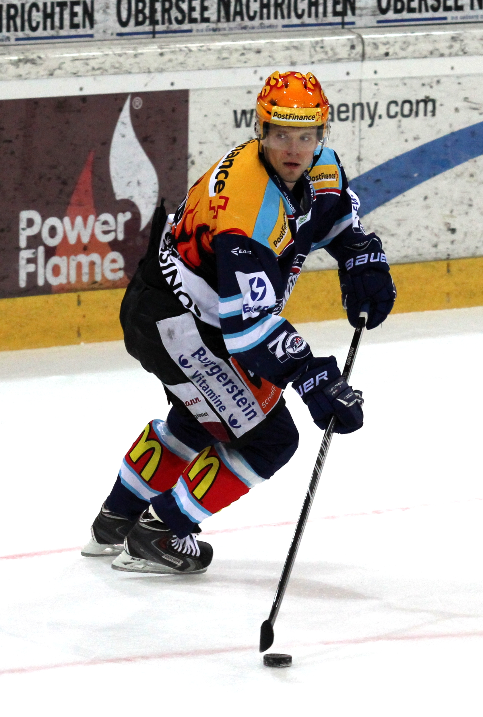 Nicklas Danielsson (RJ 44, TS).